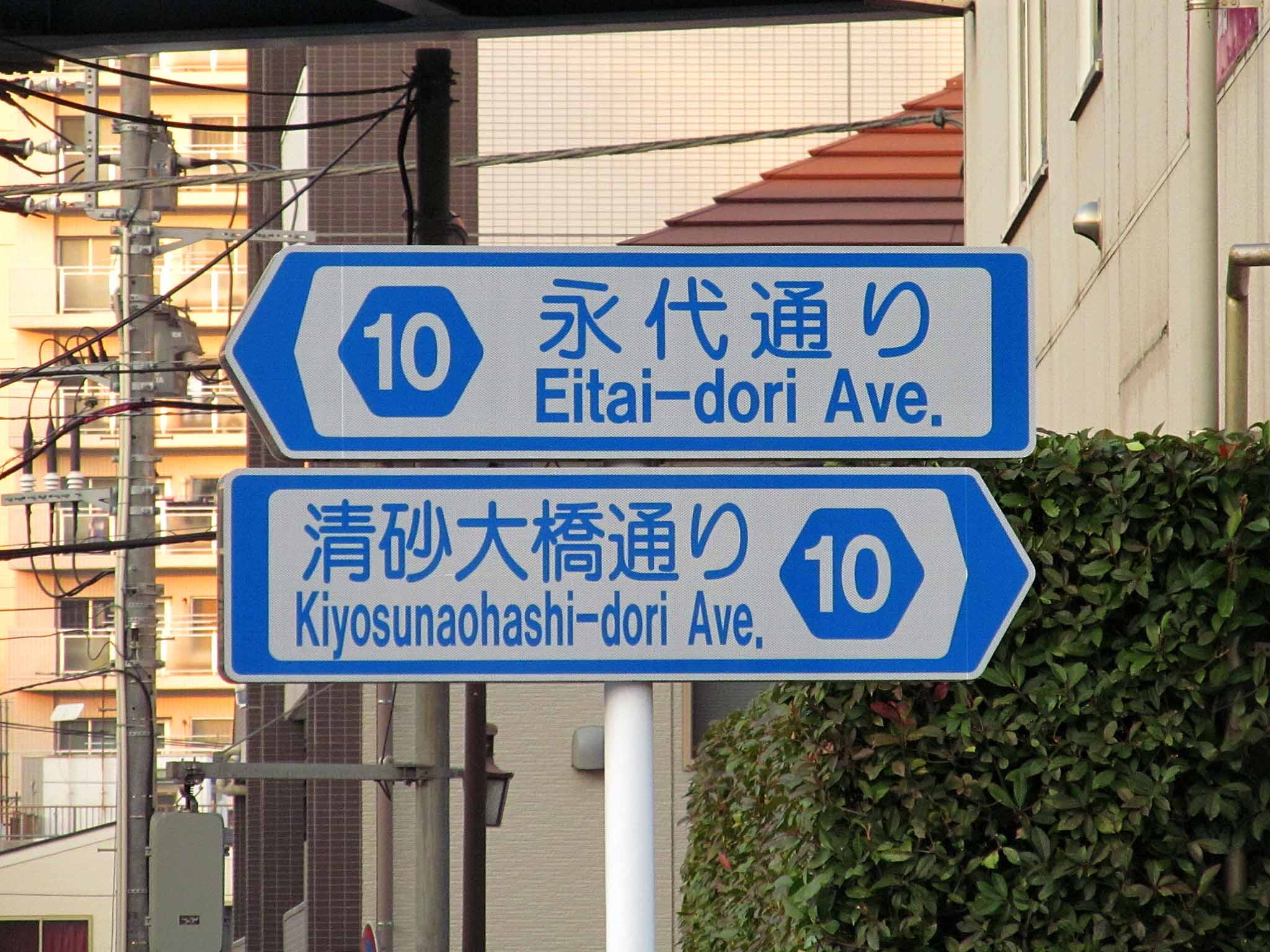 東京都道10号東京浦安線の通称「永代通り」と「清砂大橋通り」の標識。江東区新砂の清砂大橋西詰め交差点を境に名称が変わる。